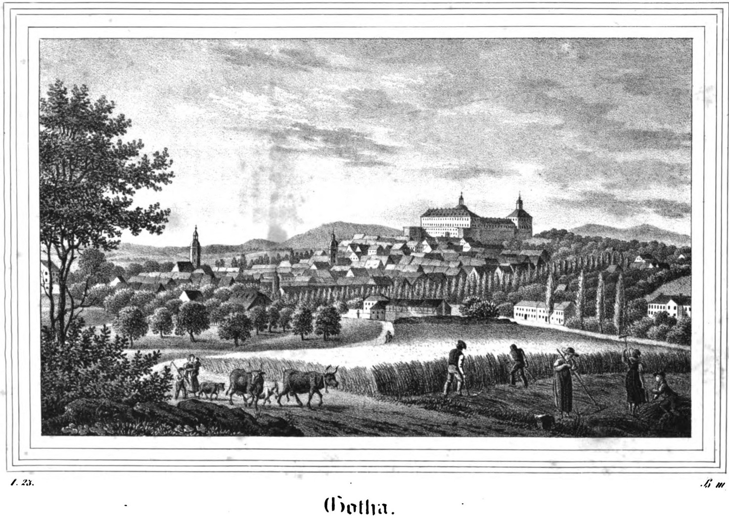 Saxonia Museum für saechsische Vaterlandskunde. Band 1. Dresden: Pietzsch und Comp. Siehe File:Saxonia Museum für saechsische Vaterlandskunde I.djvu